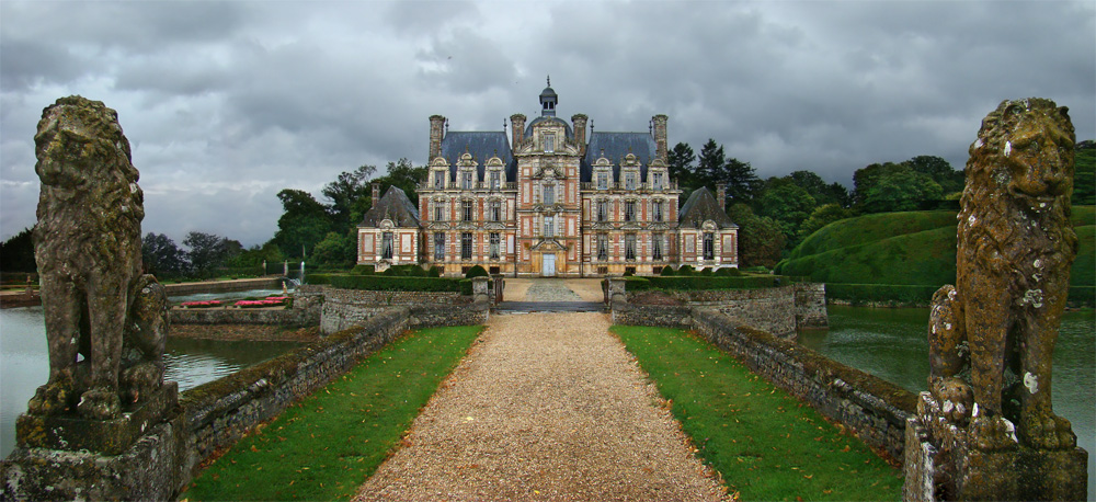 Château de Beaumesnil, Eure, Normandie, France.